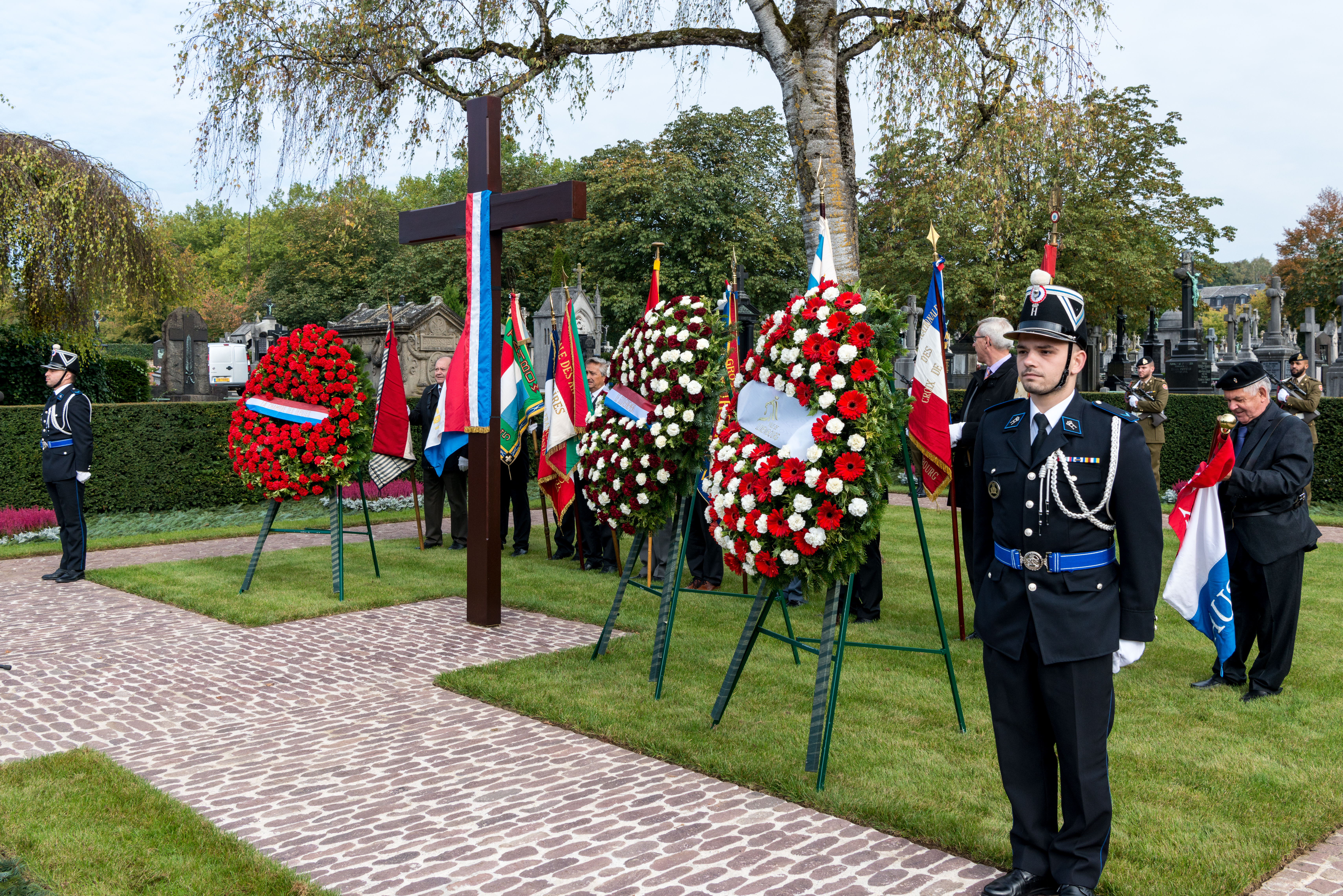 D'Journée de la commémoration nationale erënnert un d'Lutte vum Lëtzebuerger Vollek géint d'Nazi-Okkupatioun am Zweete Weltkrich. D'Commemoratioun ass am Oktober, um Sonnden deen am notse beim 10. Oktober läit. Se erënnert domat un den Echec vun der Personenstandsaufnahme vum 10. Oktober 1941. Feierlechkeete ginn a ville Gemengen ofgehal, an der Stad Lëtzebuerg sinn et der gläich dräi: Beim Nationalmonument vun der Lëtzebuerger Solidaritéit um Kanounenhiwwel, bei der Gëlle Fra op der Constitutiounsplaz a beim Hinzerter Kräiz um Nikloskierfecht. No de Feierlechkeeten um Kanounenhiwwel a bei der Gëlle Fra gouf den 9. Oktober 2016 eng weider Zeremonie beim Hinzerter Kräiz ofgehalen. Nom Discours vum Xavier Bettel hu Vetrieder vun der kathoulescher an der protestantescher Kierch eng Ried gehalen an de Groussrabbiner huet de Kaddish gebiet. Kränz goufen vum Chamberpresident Mars Di Bartolomeo, vum Premier Xavier Bettel a vun der Stater Buergermeeschtesch Lydie Polfer néiergeluecht.